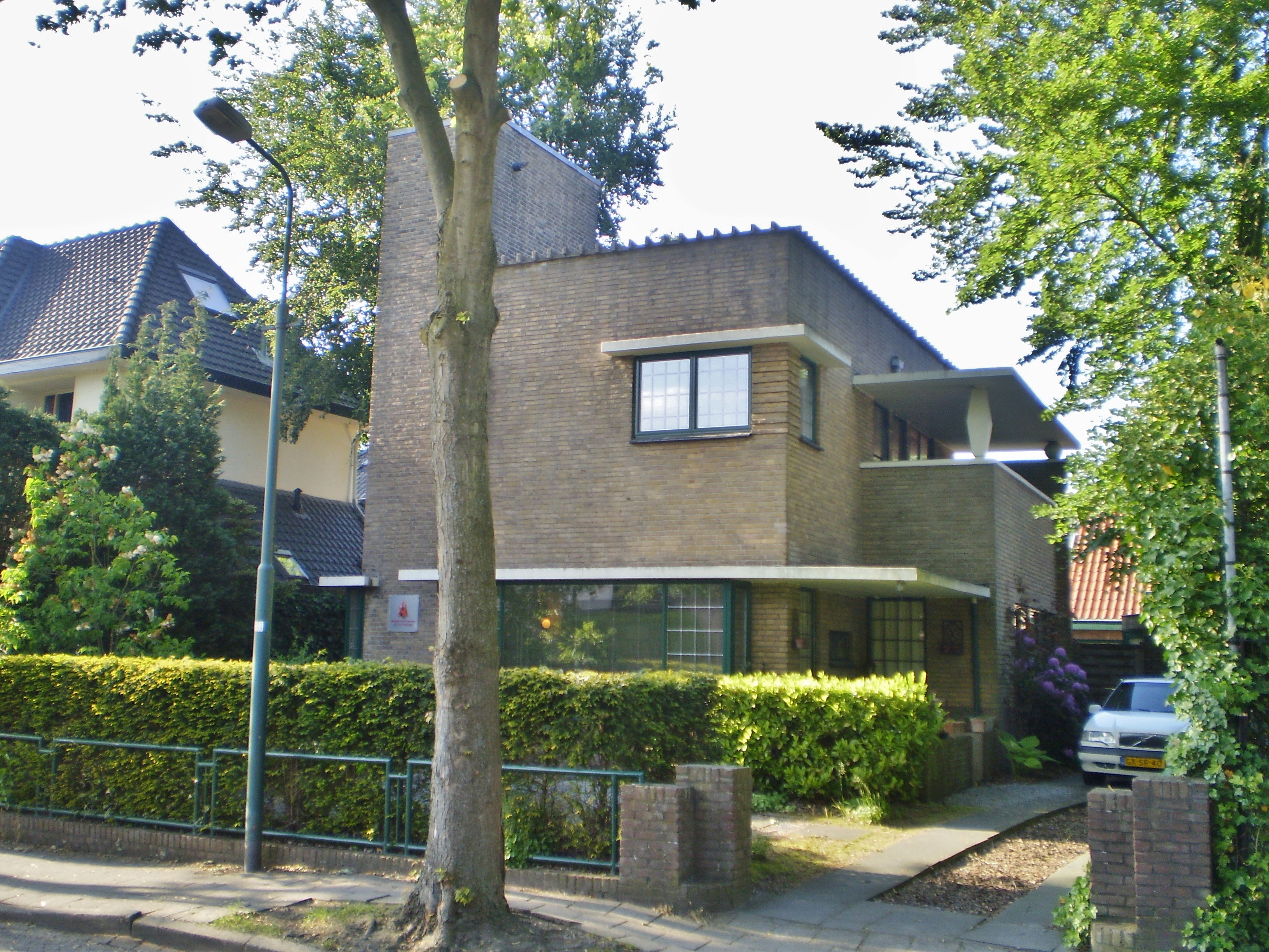 rijksmonument